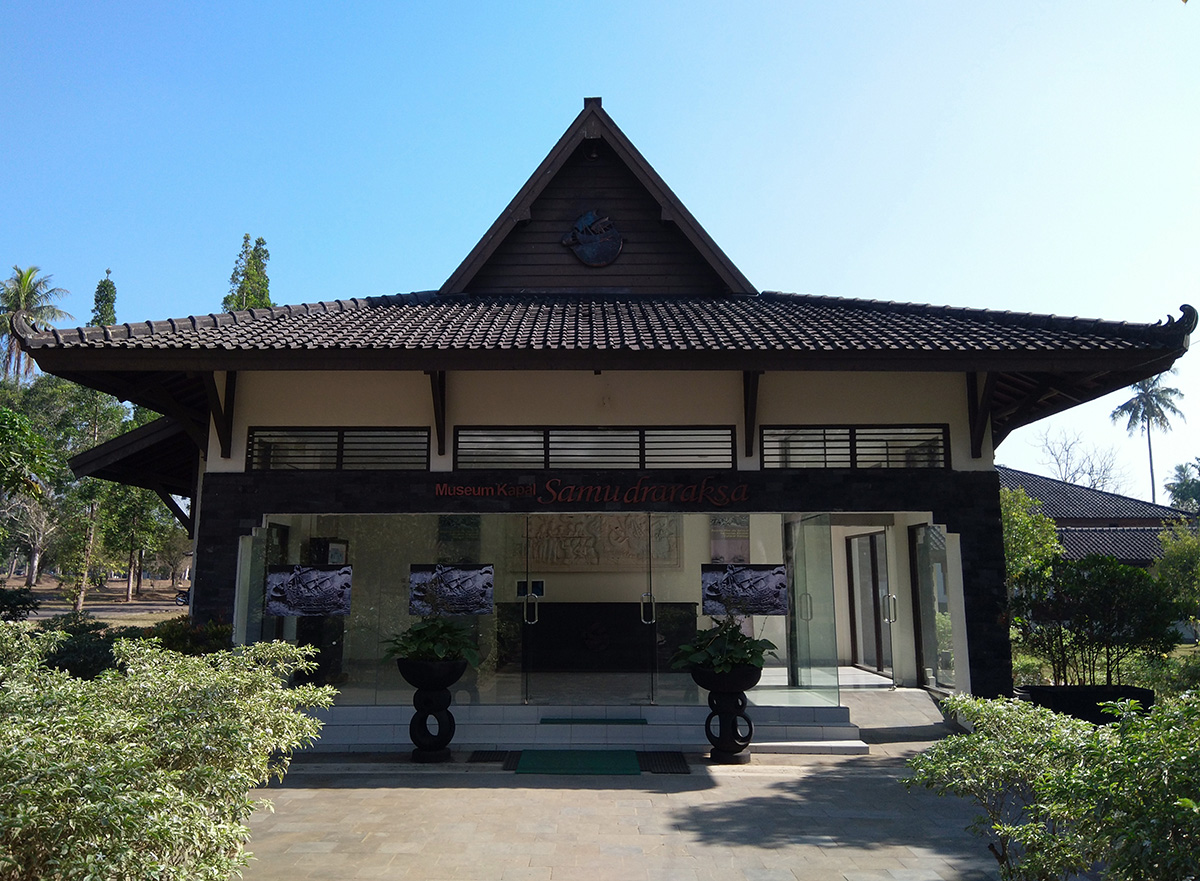 Tampak depan Museum Kapal Samudraraksa